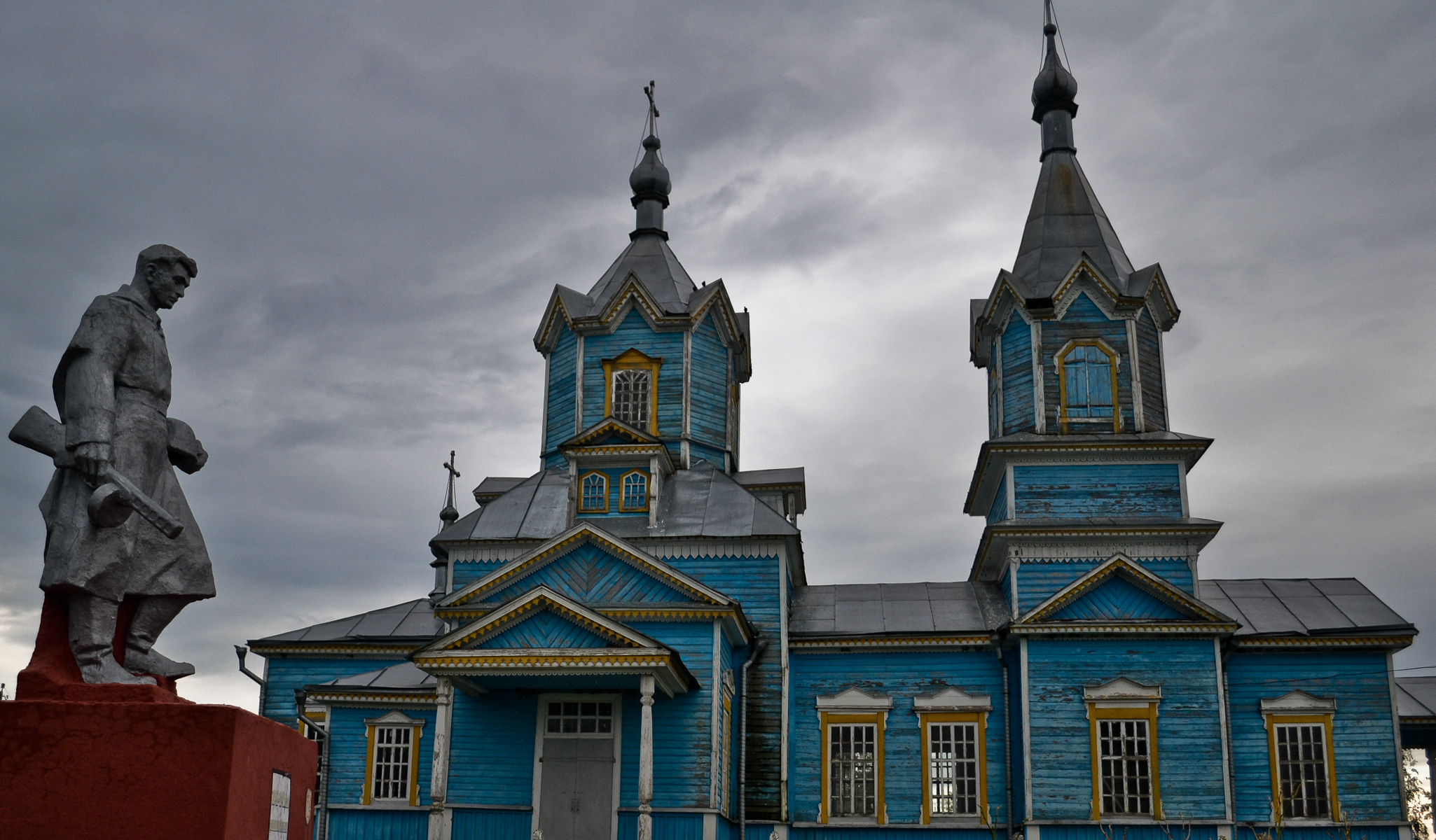 Беларуская (тарашкевіца): Царква. в. Чырвоны Партызан This is a photo of Belarusian heritage monument. Reference number: 313Г000280 ( WLM)